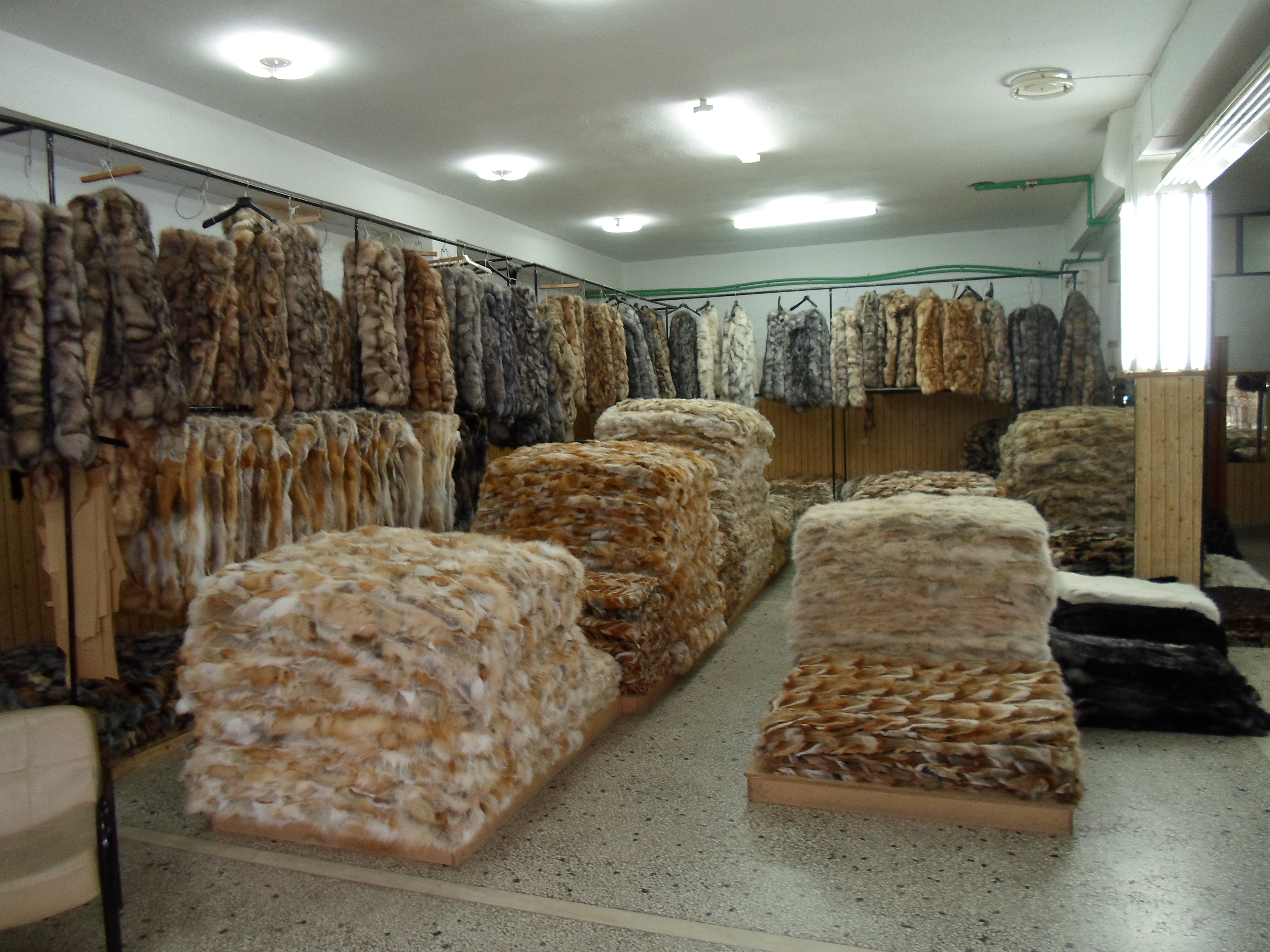 Eine Kürschnerei in der Stadt Kastoria, Griechenland. Lager mit Halbfertigprodukten aus Fuchsstücken. Siehe auch Kürschner in der Präfektur Kastoria und Kürschner in der Stadt Siatista.